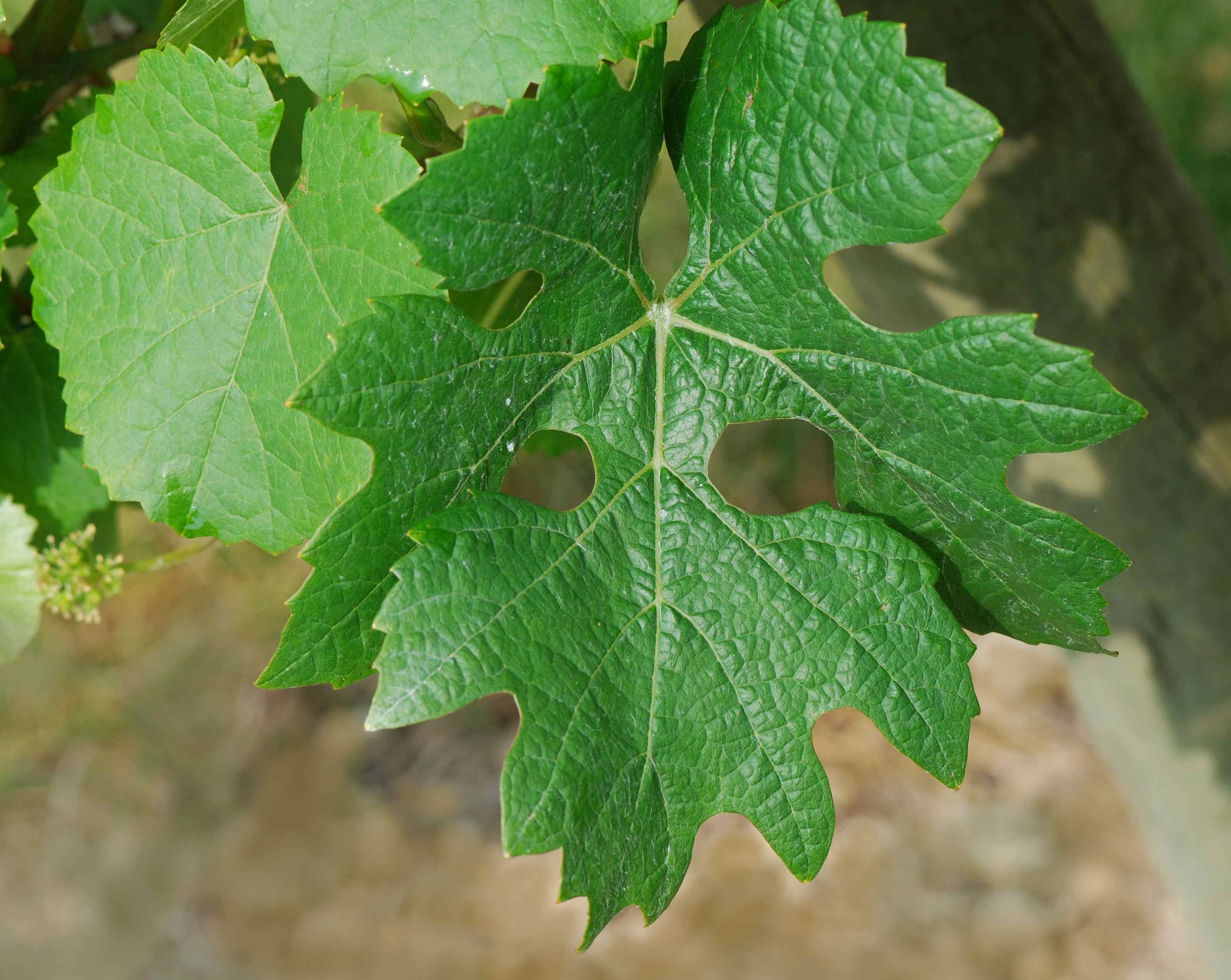 Feuilles de Cabernet Sauvignon, conservatoire du vignoble charentais, Cherves